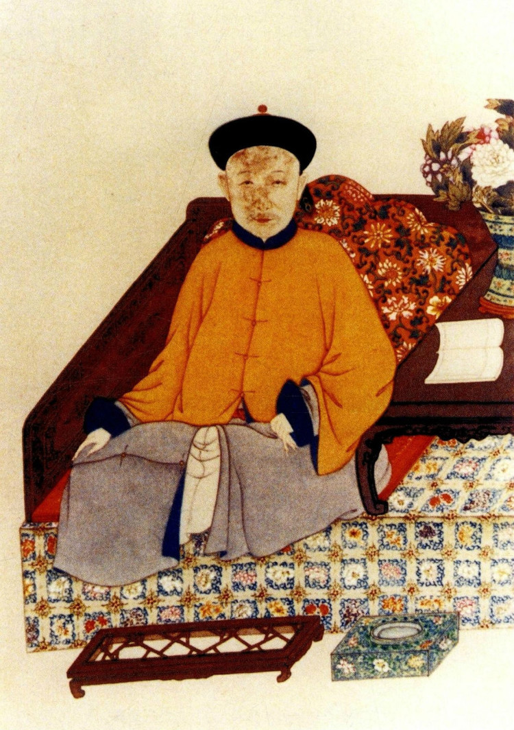 福康安便服像